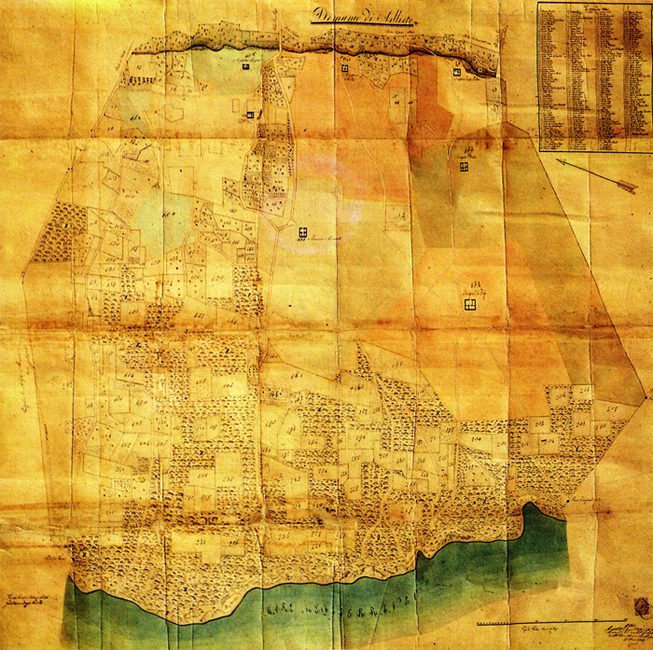 Description= Pianta topografica del demanio allistino redatta da Gaetano Buja nel 1846. Source= own work Date= 1986 Author= Antonio47